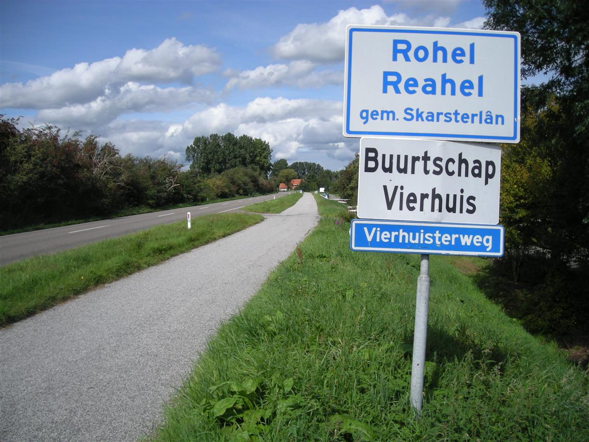 Vierhuis bij Rohel in Friesland